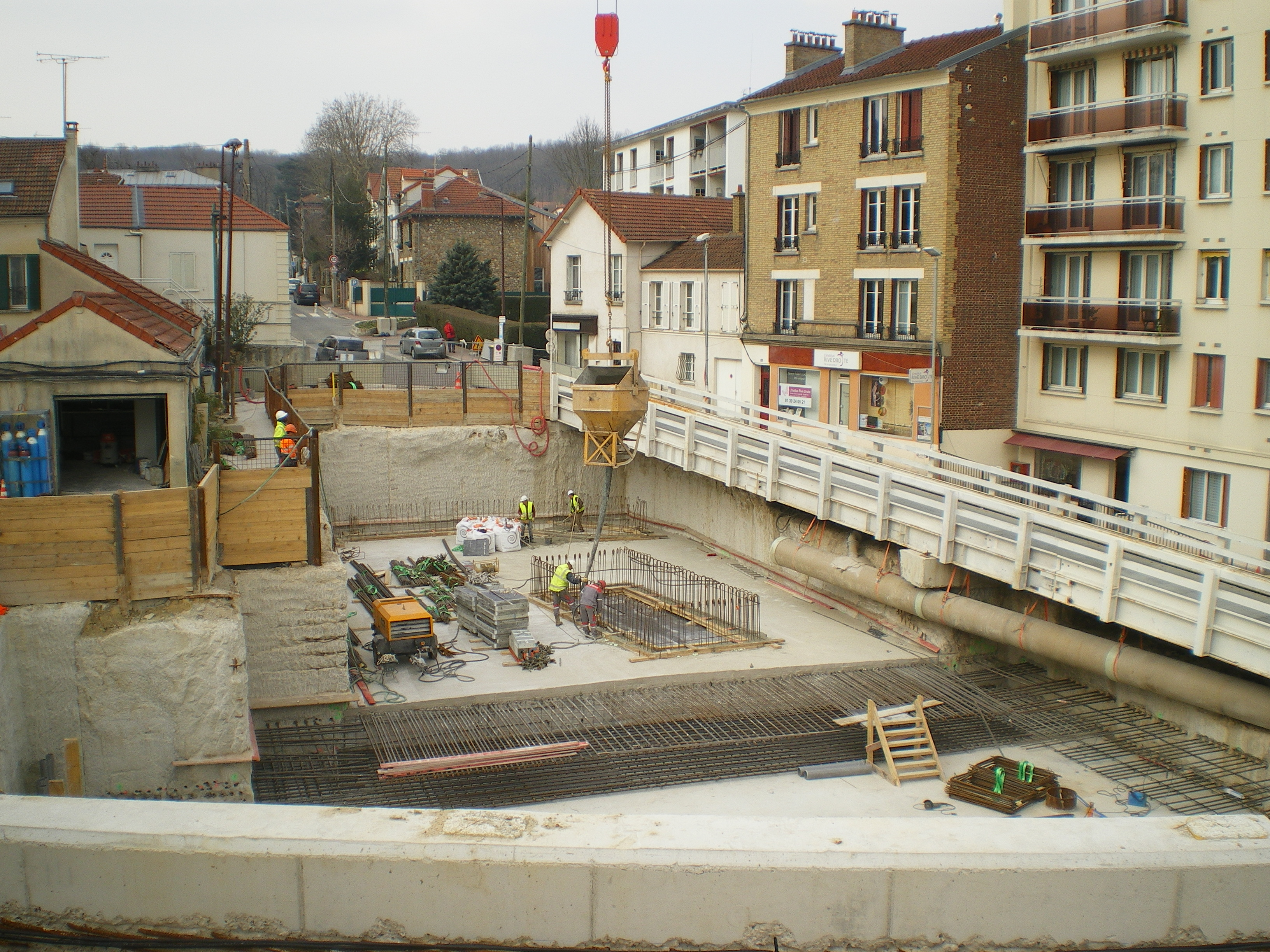 Travaux T6 viroflay RD